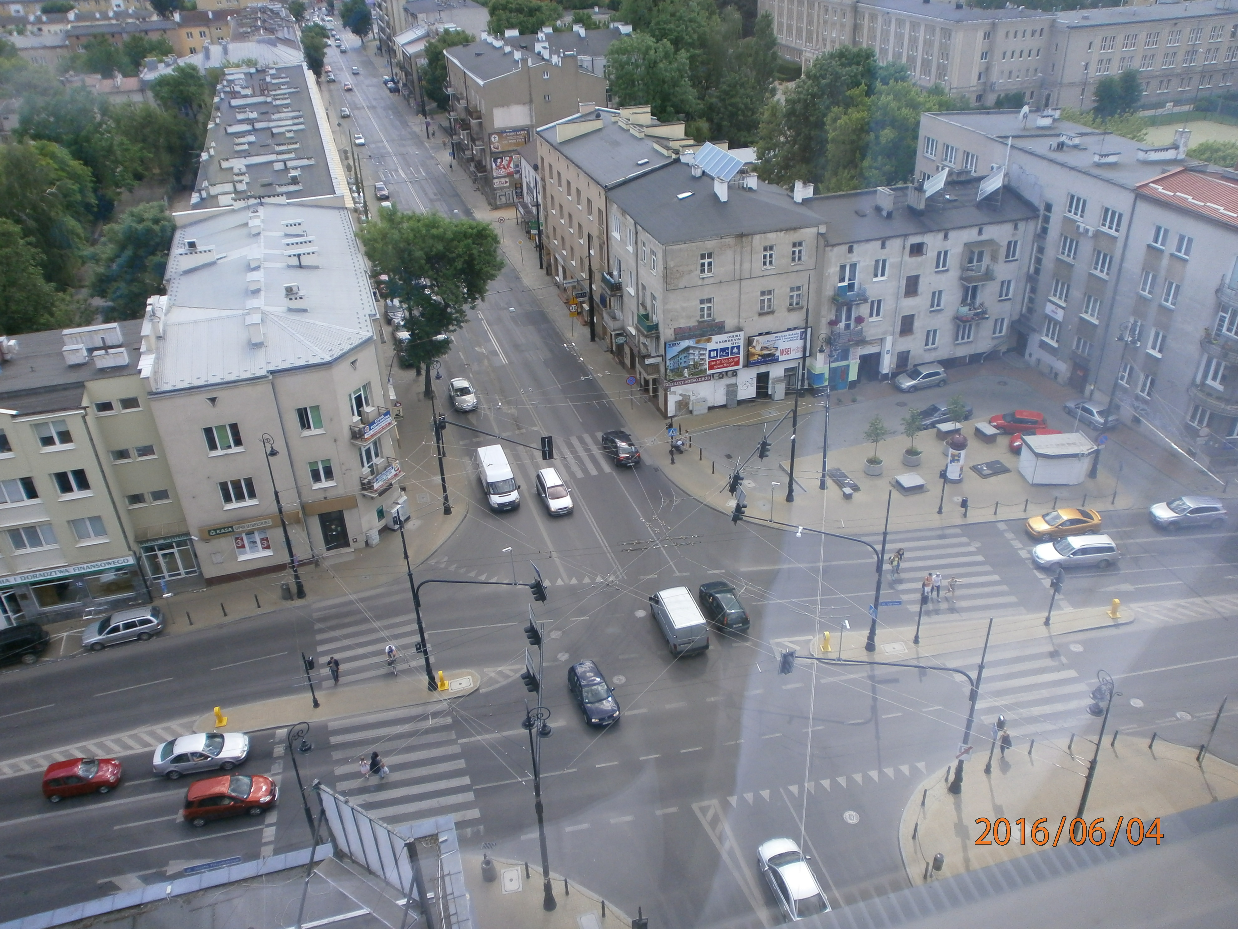 Перехрестя у центральній частині Любліна